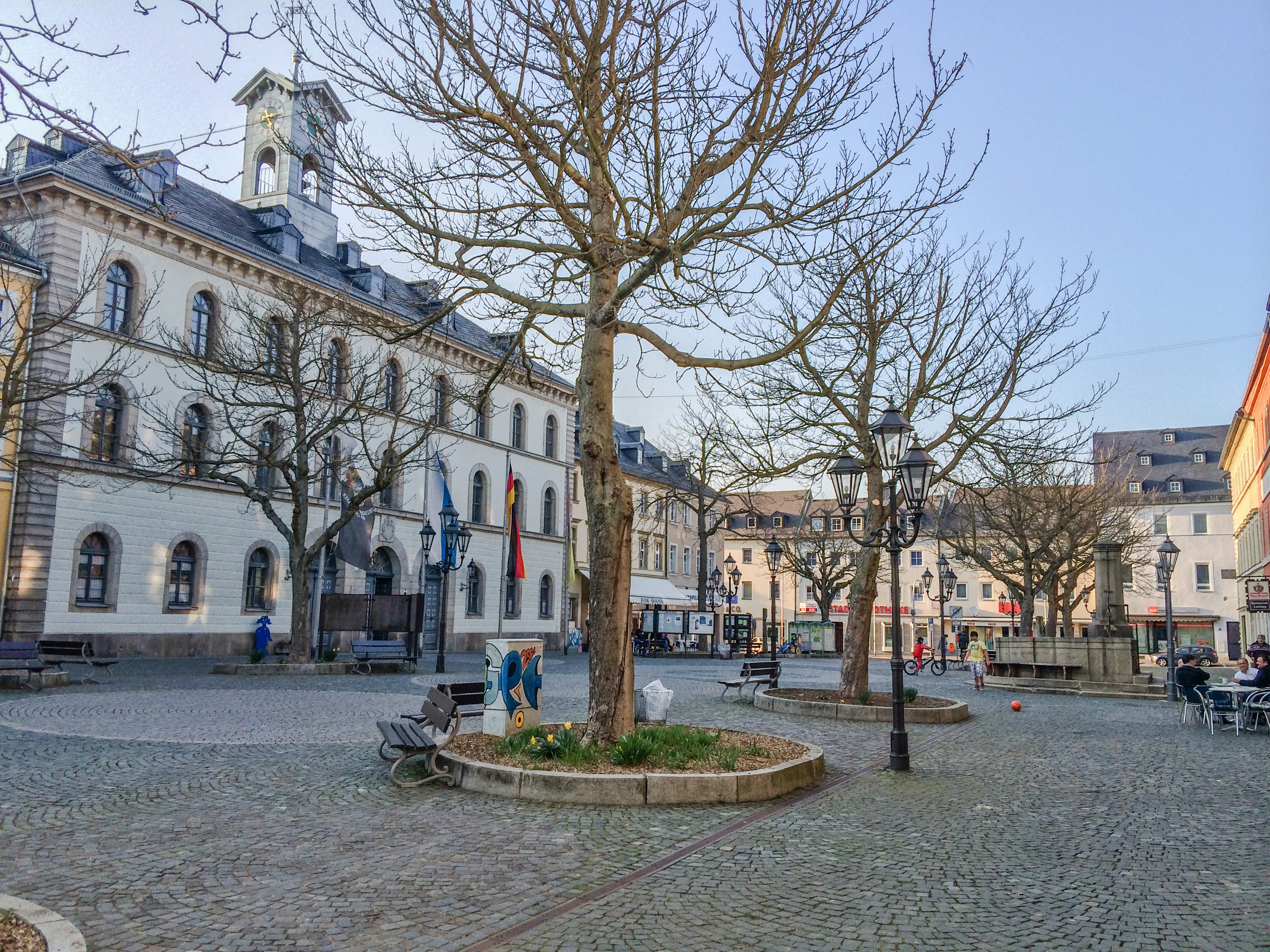 Ansicht Wunsiedel Innenstadt. März 2014